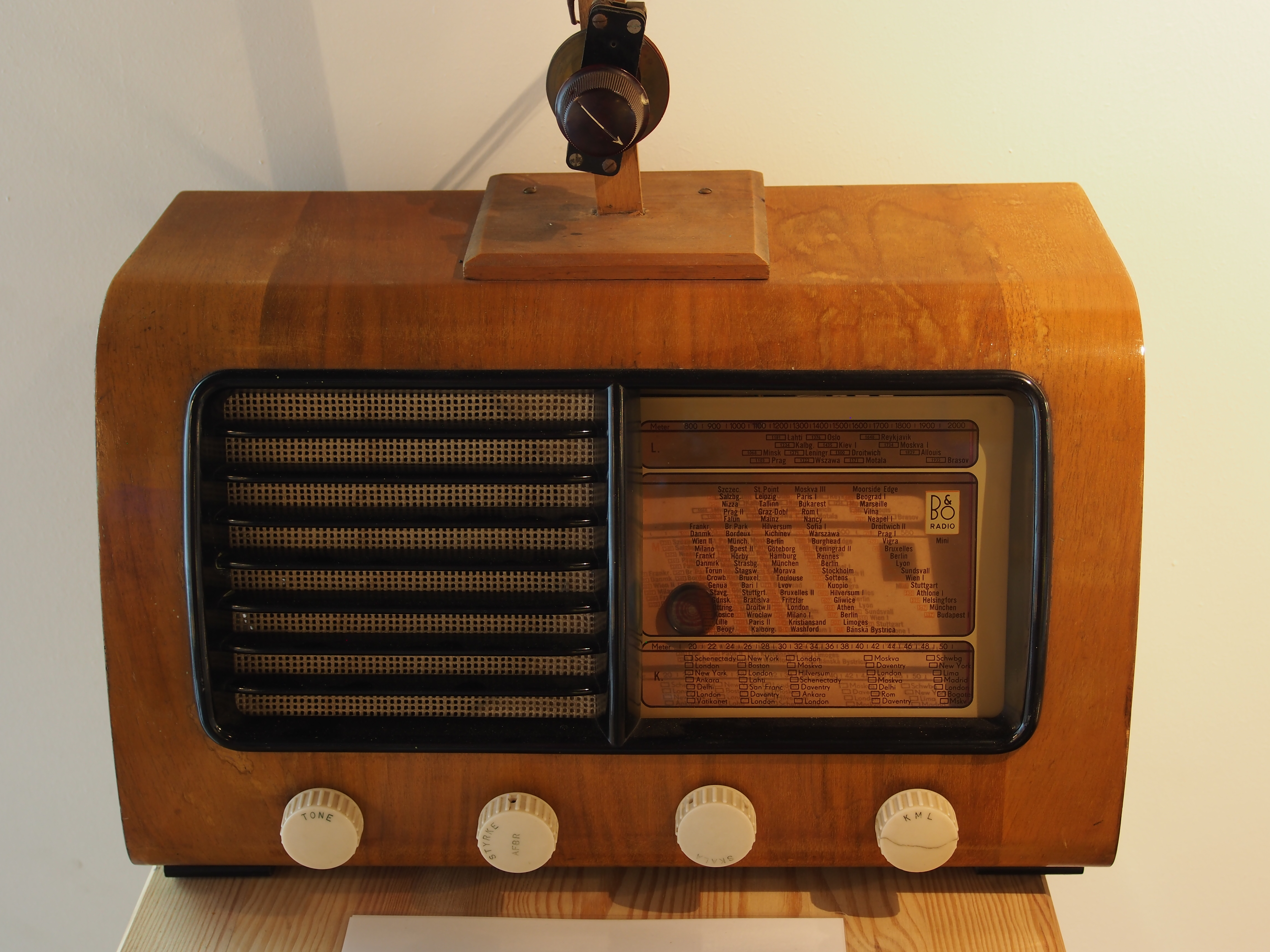 Photographed at Aalborg, Denmark.